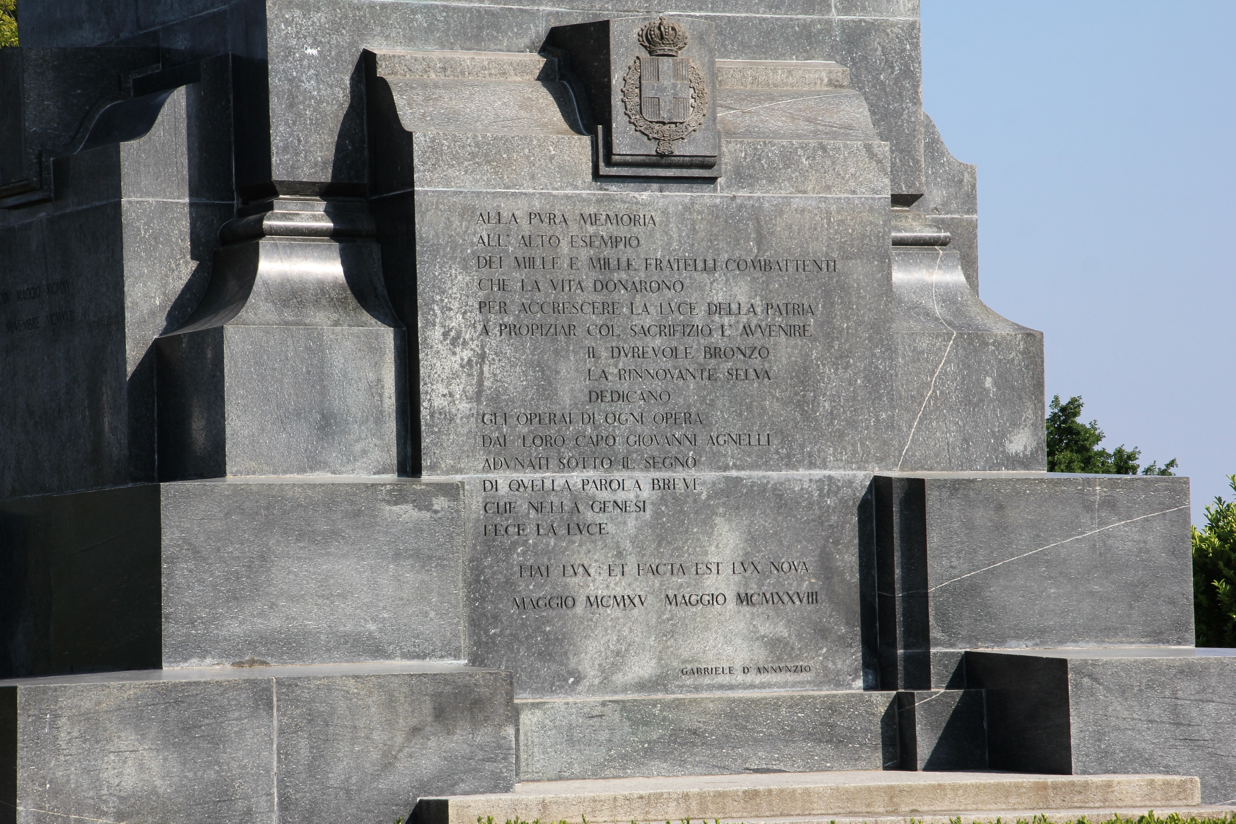 Torino, faro della Vittoria